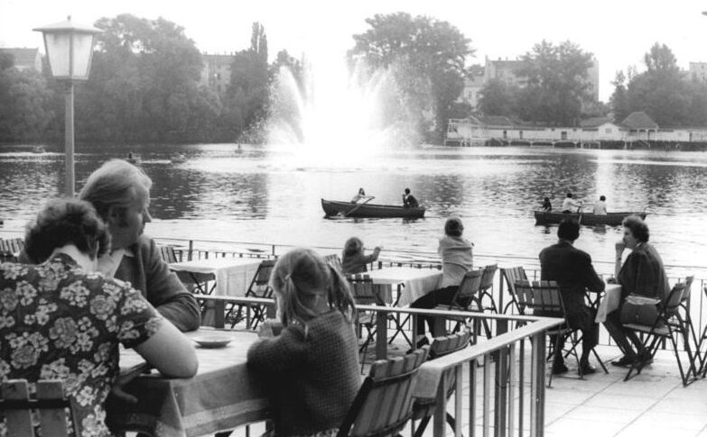 ADN-ZB-2.7.72-ill-Berlin: Wechselhaftes Wetter sorgte am Wochenende für nichtausgelastete Ausflugsstätten und Freiluftcafés. Wer aber trotzdem "warm" bleiben wollte, besorgte sich - wie hier auf dem Weißen See - einen Ruderkahn."